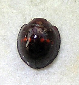 Chilocorus bipustulatus from Jerusalem, Israel